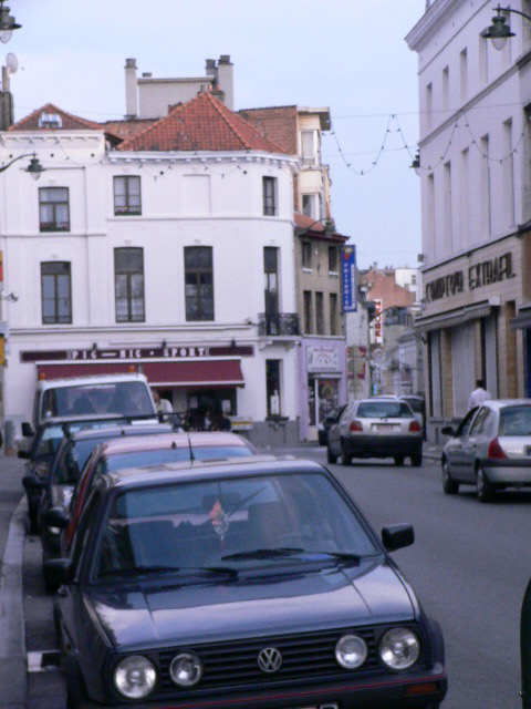 Auteur Poulsen, tous les droits cédé à la Wikimedia Foundation - Chaussée de Gand